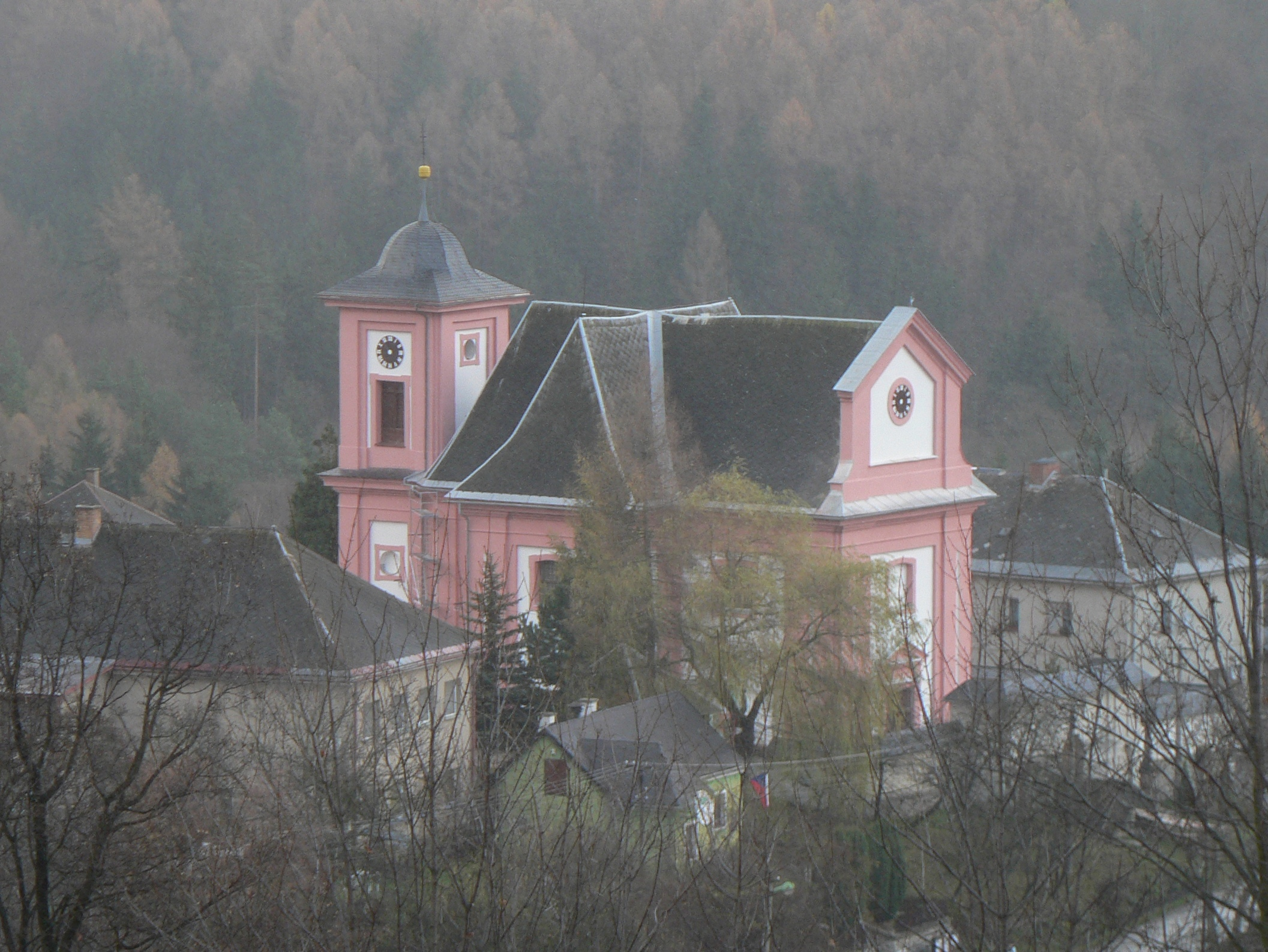 Kostel Nanebevzetí Panny Marie (Jakubovice)